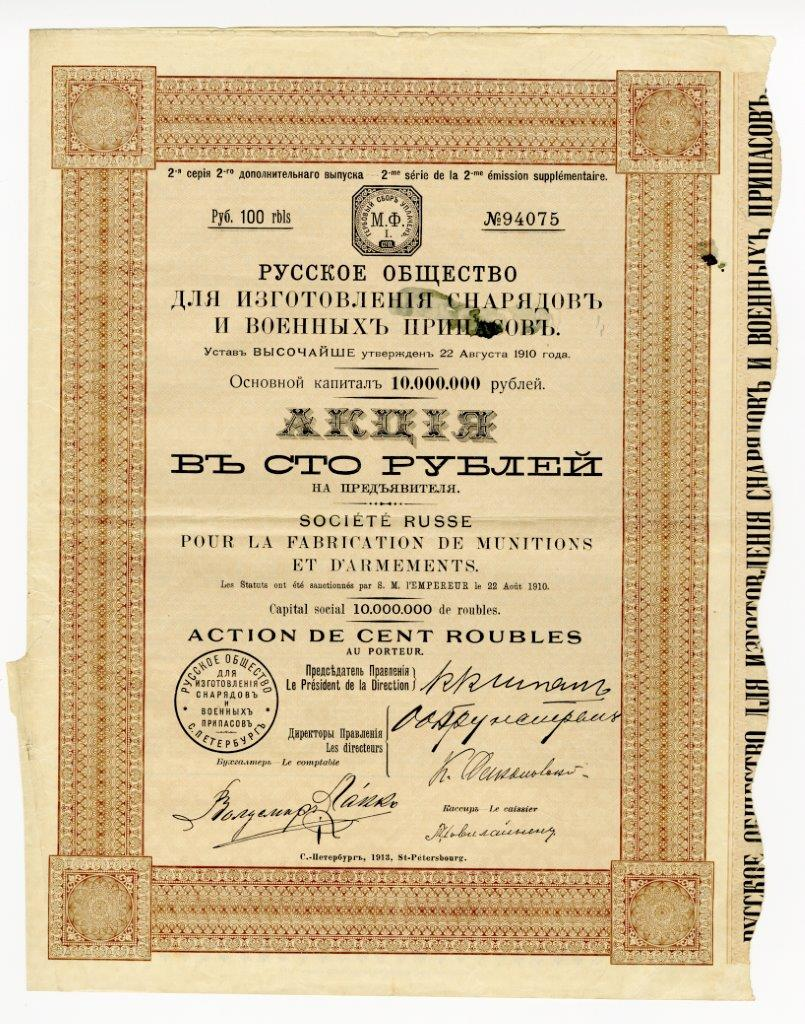 Акция в 100 руб. на предъявителя Русского общества для изготовления снарядов и военных припасов с основным капиталом в 10 млн. руб. С.-Петербург, 1912 г.